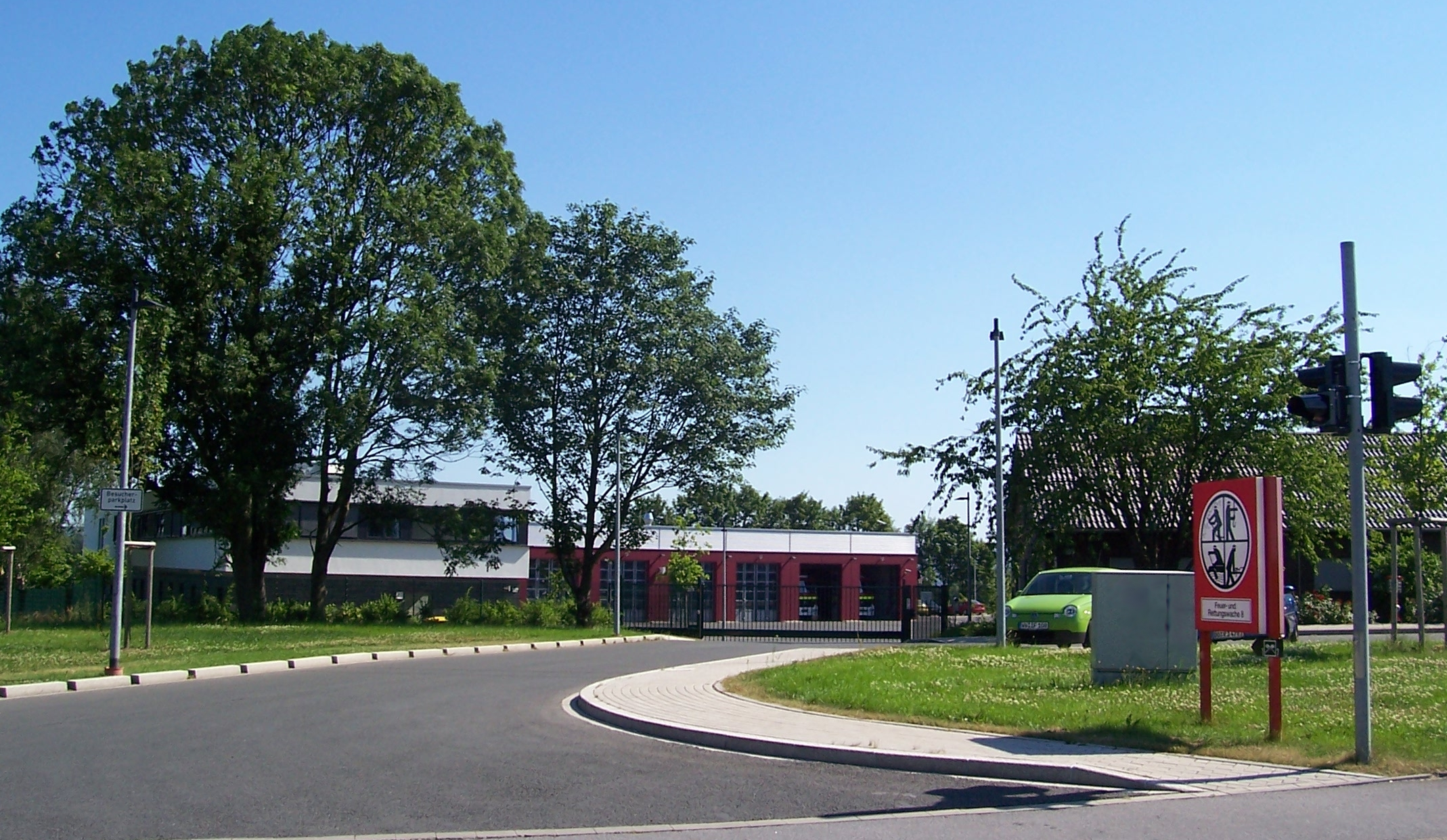 Feuer- und Rettungswache 8, Fire station 8 in Dortmund, Germany